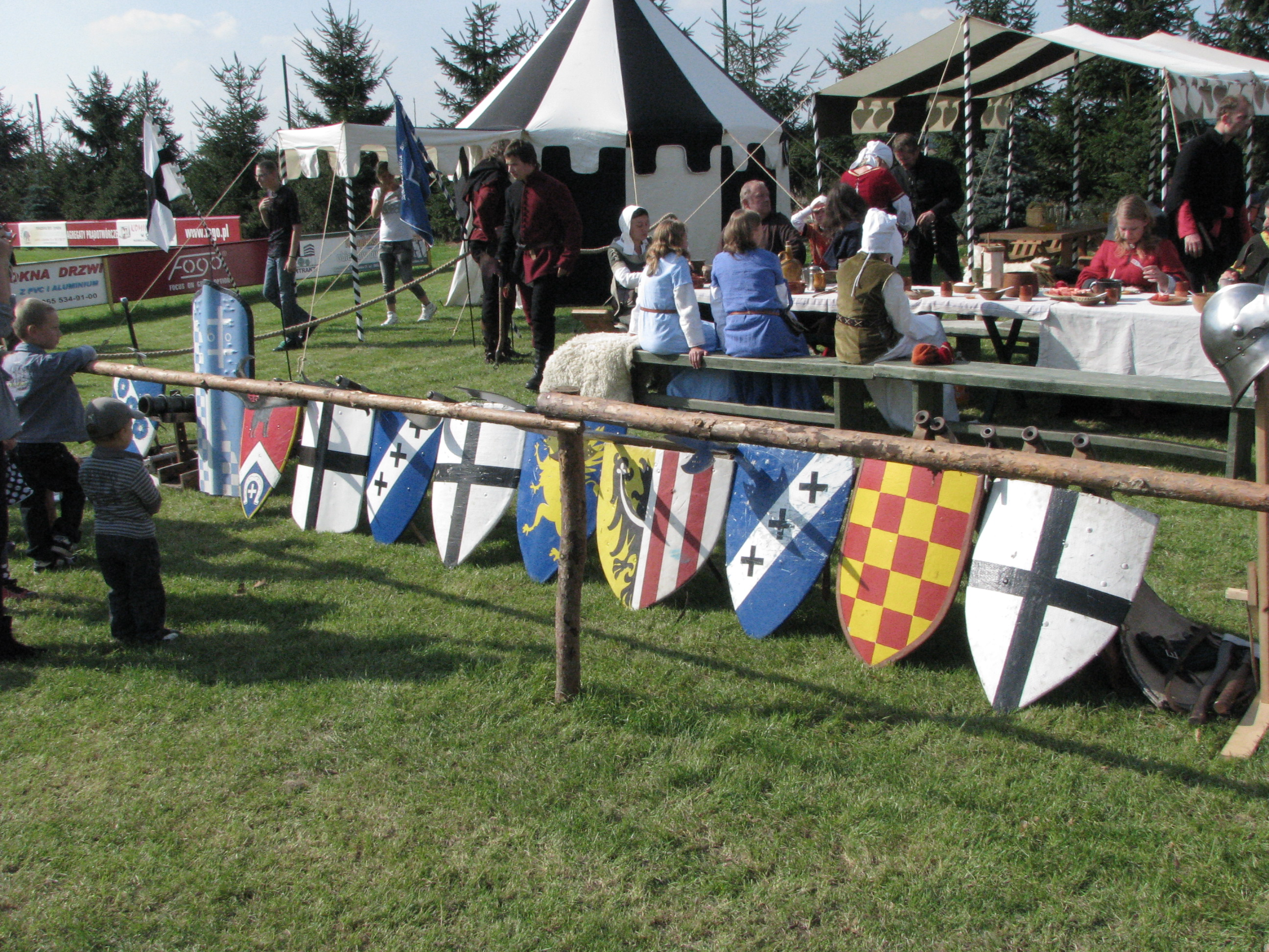 Repliki sredniowiecznych tarcz